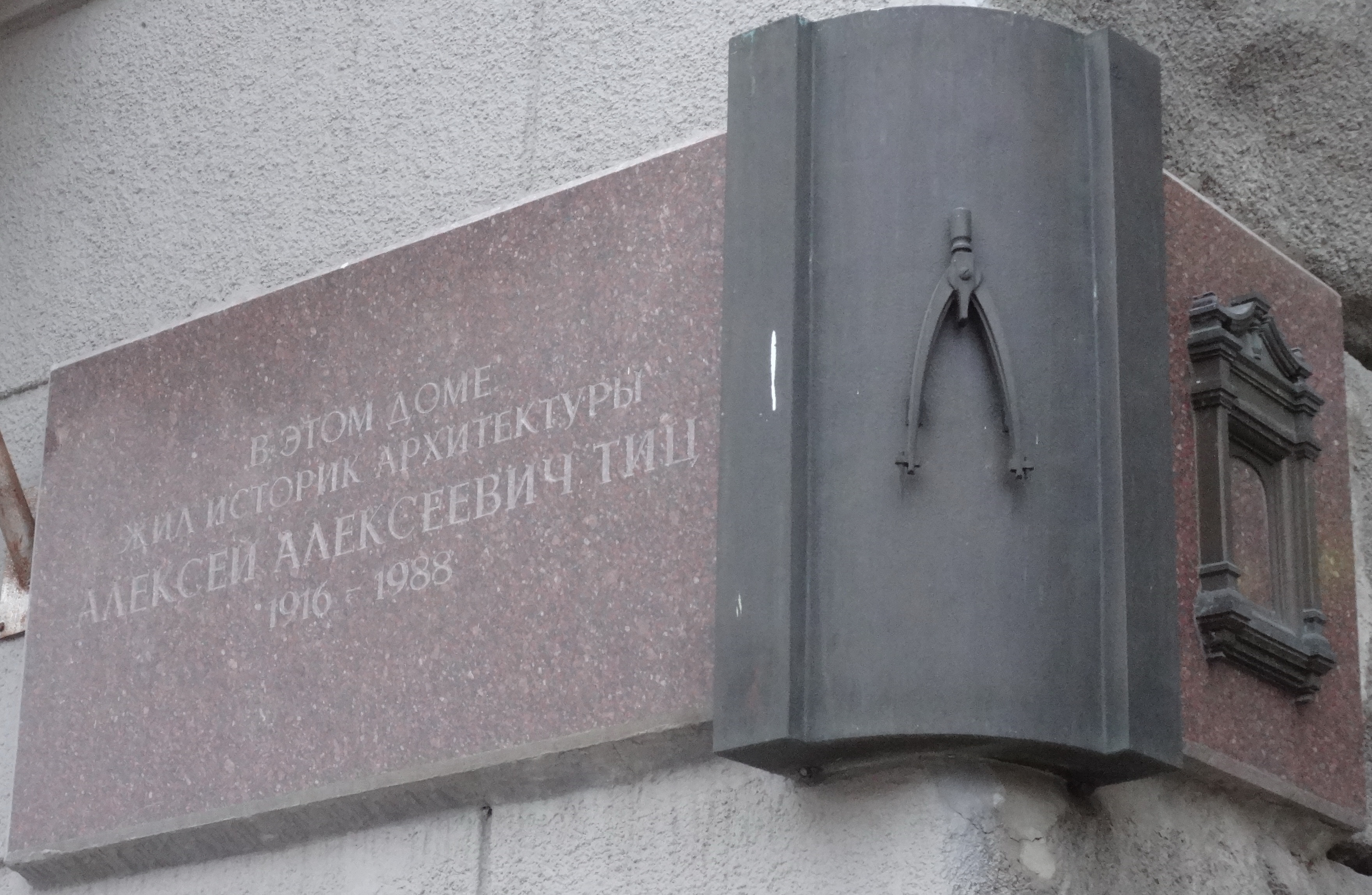 Дошка Тіцу Олексію Олексійовичу